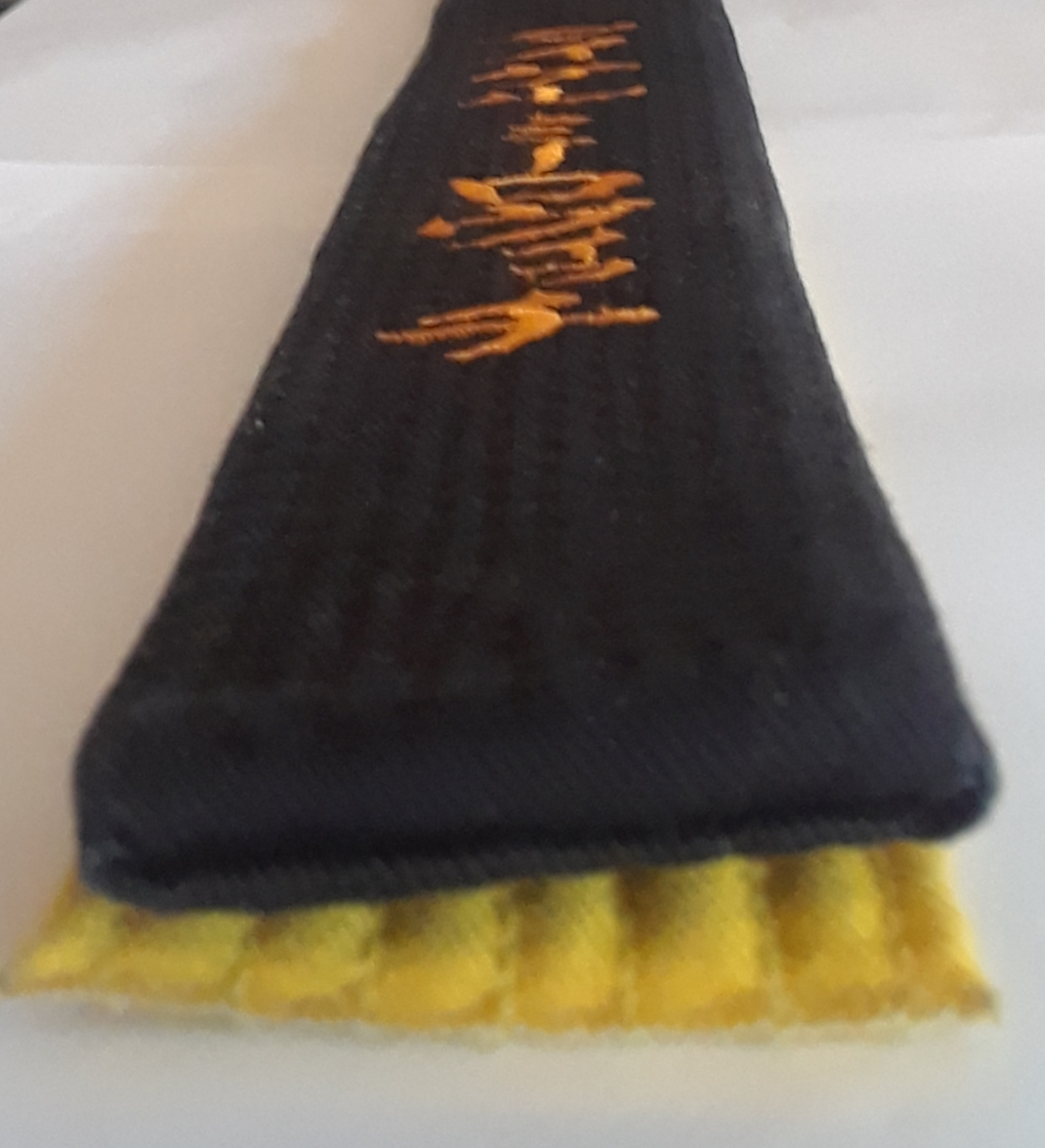 Сравнение толщины ученического/цветного (8-й кю) и мастерского/чёрного поясов и пример именной маркировки пояса (катаканой) в карате сетокан